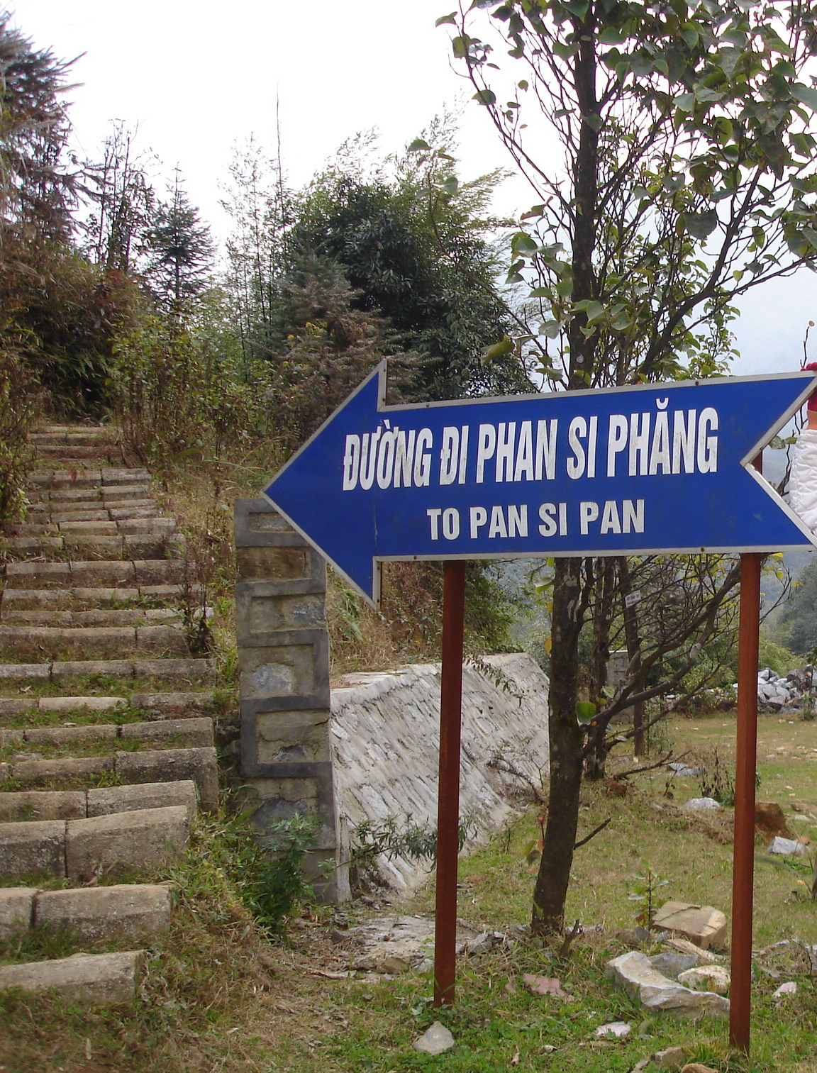 == Giấy phép ==